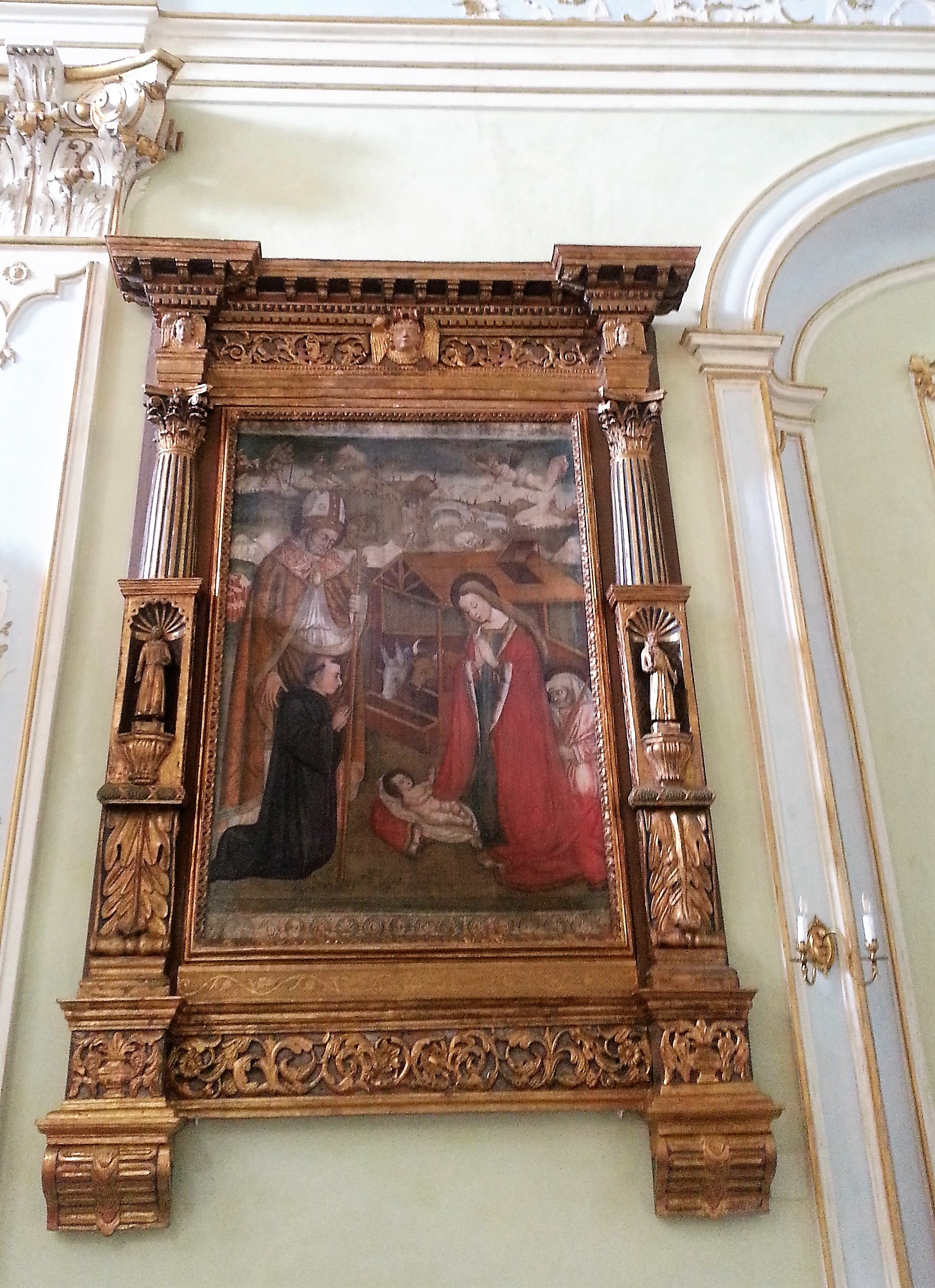 La Natività pala nella cheisa di Piario